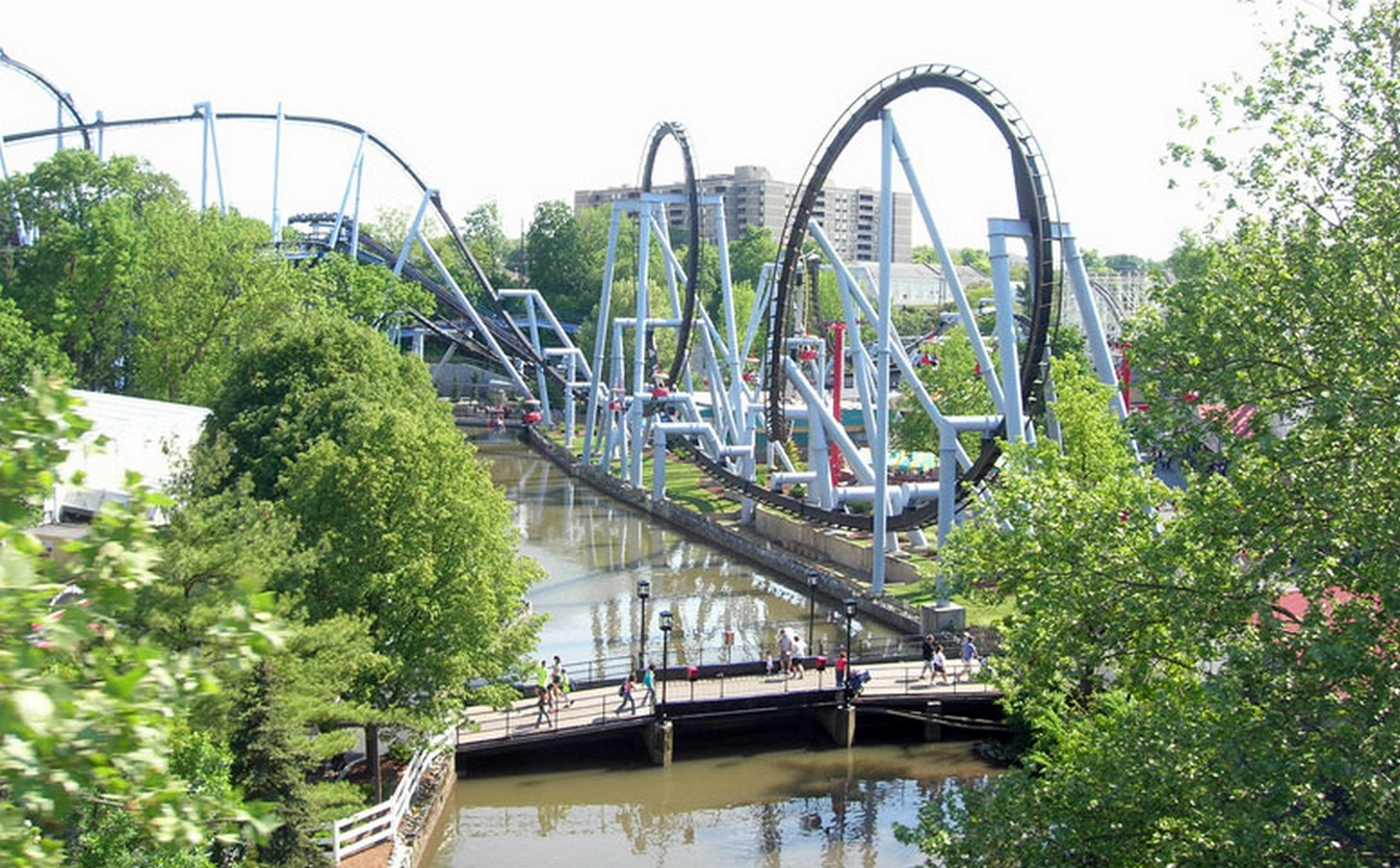 Great Bear , montagnes russes à Hersheypark